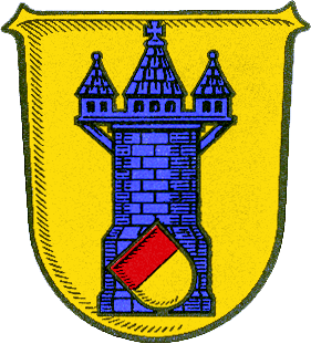 Wappen von Hungen